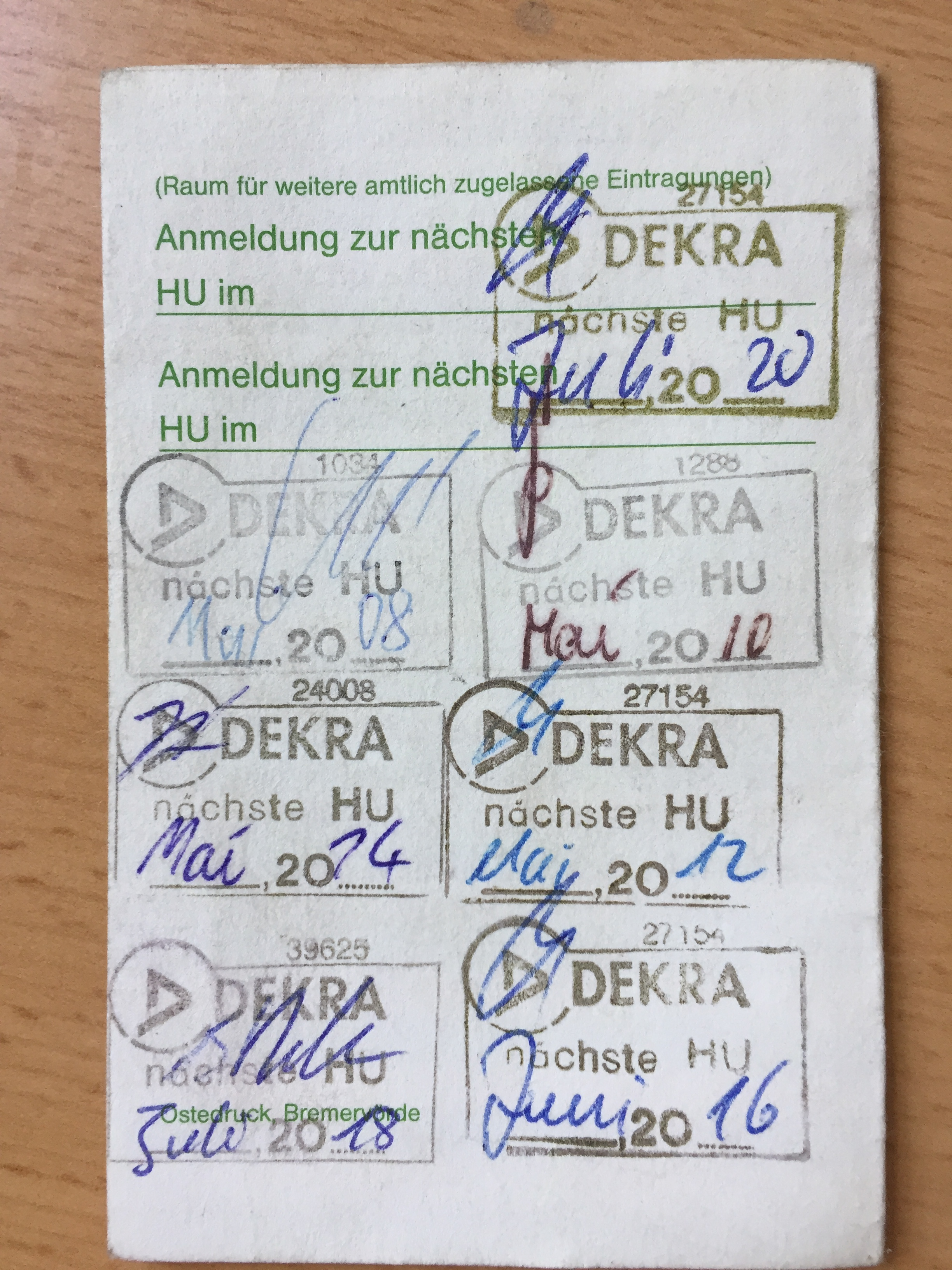 Fahrzeugschein (D) mit DEKRA-HU-Stempeln